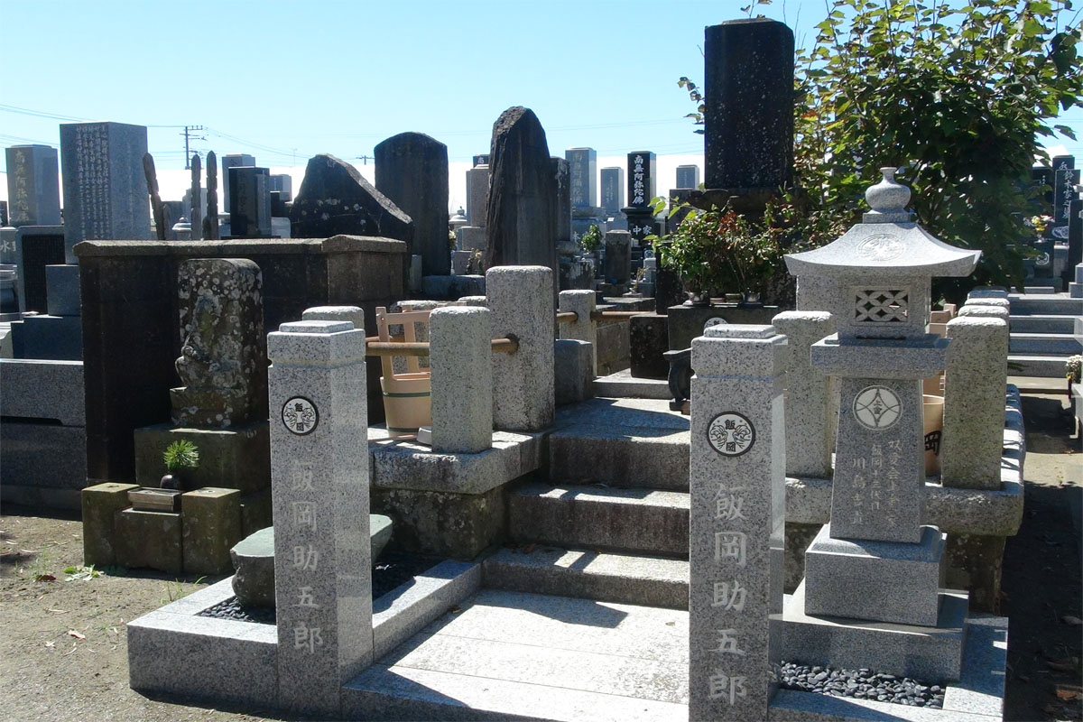 飯岡助五郎の墓(千葉県旭市飯岡町・光台寺)。2011年9月15日撮影。